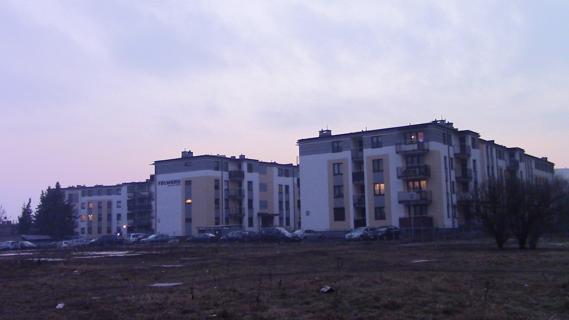 Budynek mieszkalny przy ul.Karpackiej